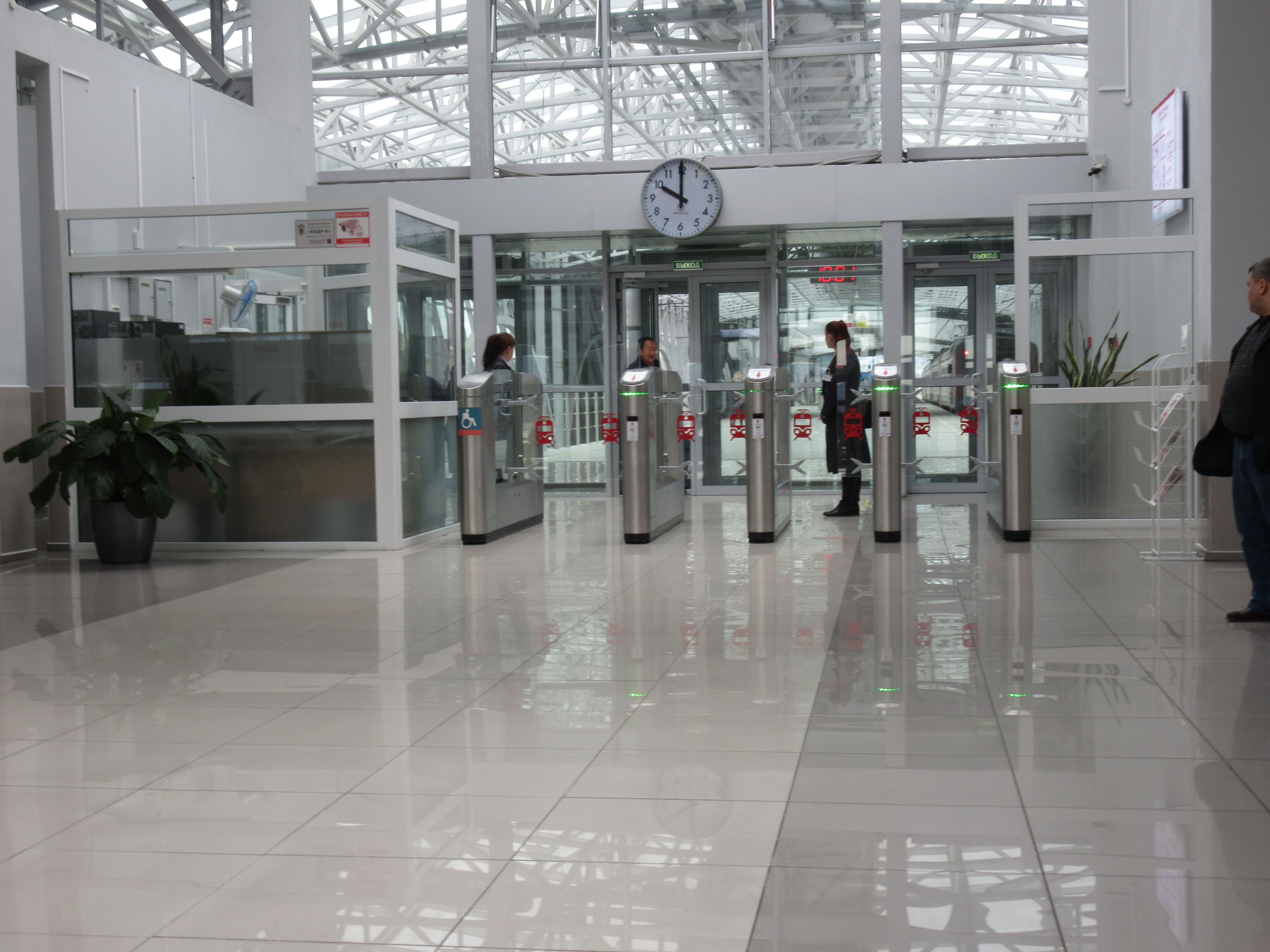 クネヴィッチ駅の改札口